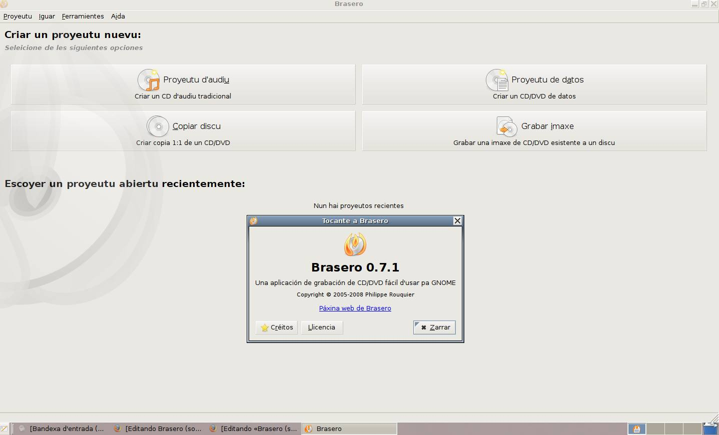 Páxina d'entamu de Brasero, na so versión n'asturianu